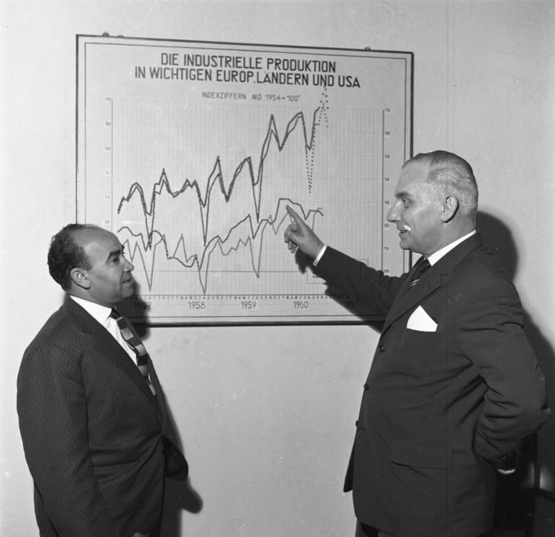 Unterzeichnung eines deutsch-marokkanischen Handelsabkommens im Wirtschaftsministerium